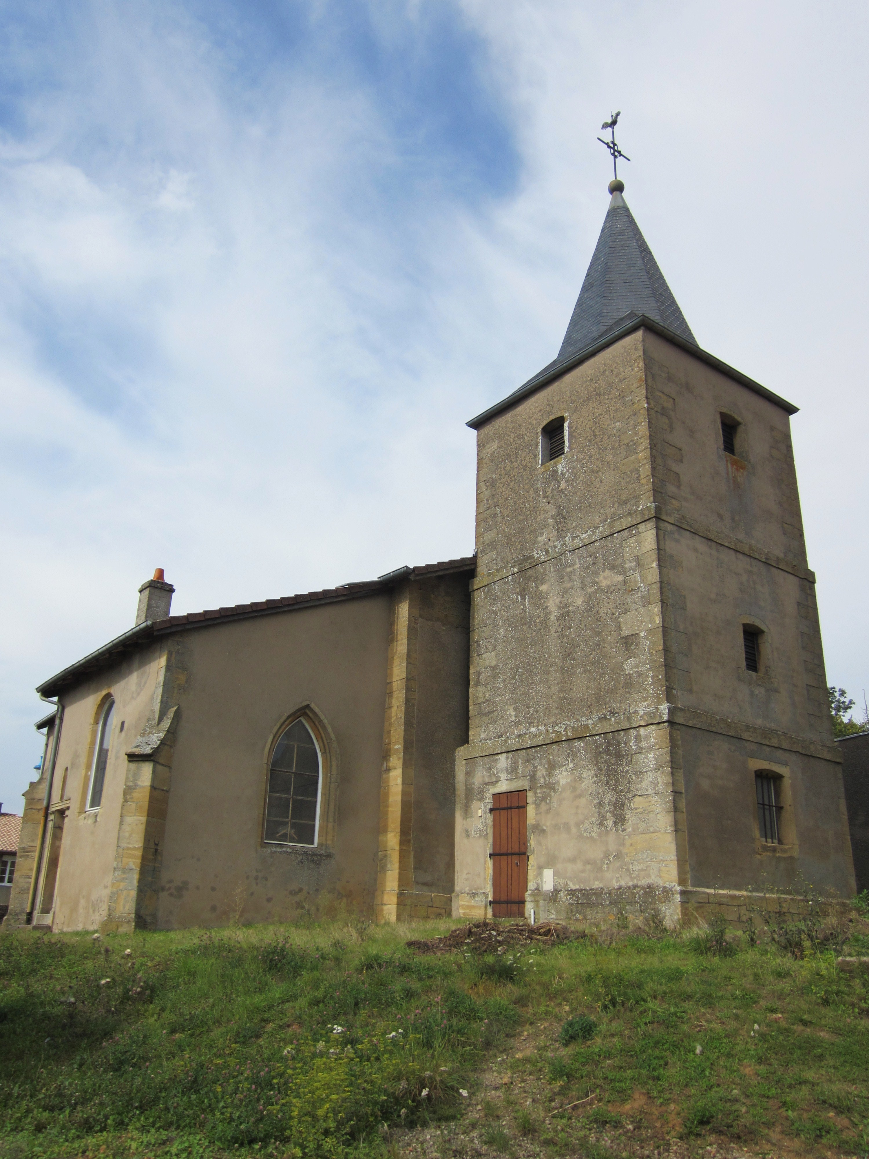 Description eglise saint didier Malavillers eglise saint didier Malavillers